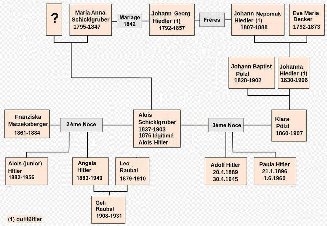 Cet arbre généalogique simplifié mentionne uniquement les personnes principales de la généalogie d’Hitler et de ses proches parents, à l’exclusion. des enfants morts en bas âge (avant la puberté) des ascendants lointains des descendants de collatéraux ayant vécus ou vivants après 1950. Pour plus de détails ou précisions se reporter à la page de Wikipedia en allemand: Hitler (Familie) Le père d’ Alois Schicklgruber né de Maria Schicklgruber en 1837, n’est pas identifié de façon certaine. Ce peut être: Johann Georg Hiedler marié à Maria Schiclkgruber en 1842, qui n'a pas formellement reconnu l'enfant de son vivant. Johann Nepomuk Hiedler son plus jeune frère suivant certains historiens Une autre personne objet de diverses spéculations et controverses Alois Schiclkgruber, père d' Adolf Hitler change de nom pour celui de Hitler en 1877 à 40 ans soit : 30 ans après le décès de sa mère 20 ans après le décès de son père légalisé Même en admettant des délais importants de procédures administratives à l'époque en Autriche Impériale cela semble bizarre. Maria Schicklgruber a toujours refusé de révéler le nom du père de son seul fils Alois